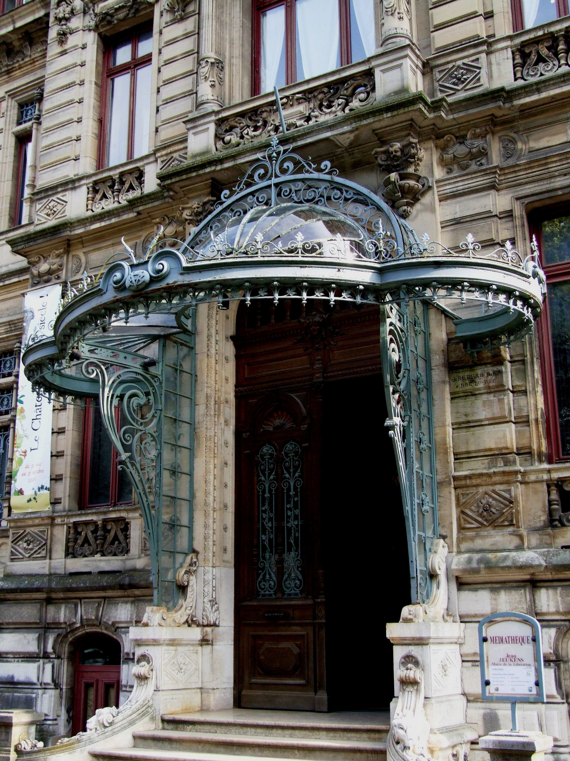 Bar-le-Duc - Château de Marbeaumont - Marquise